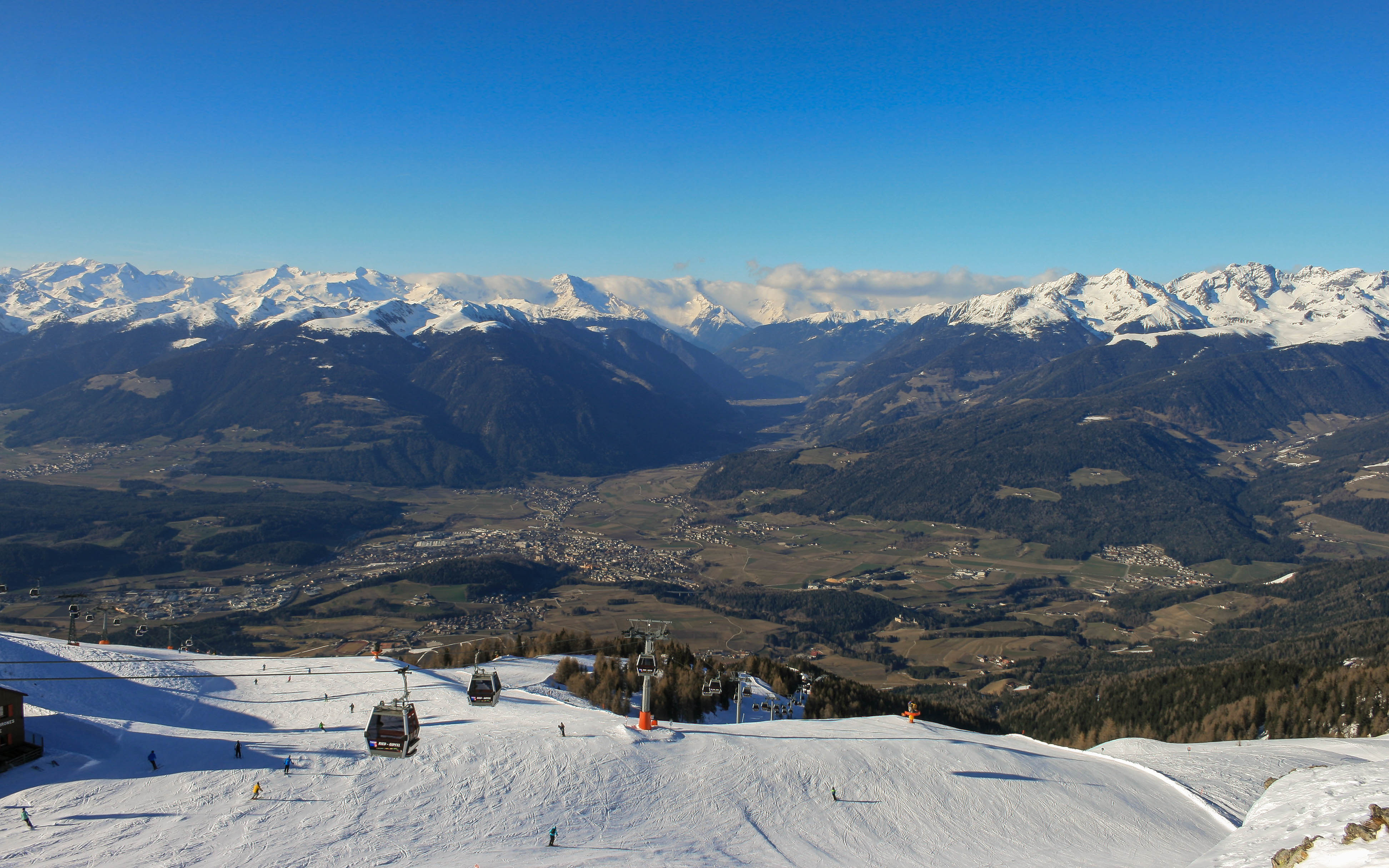 Bruneck